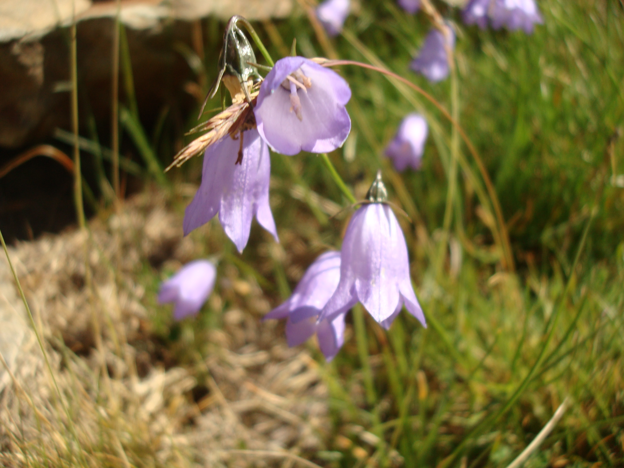 Šojcerov zvončić